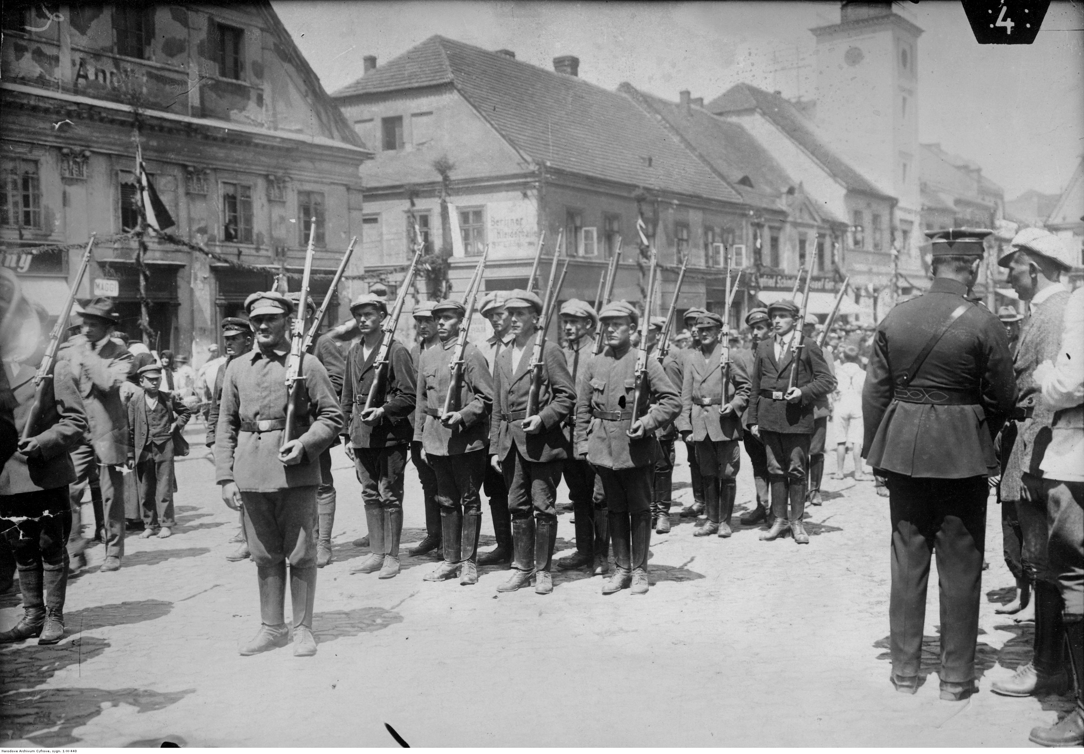 III powstanie śląskie - pododdział powstańczy w Rybniku. Widoczni ochotnicy z karabinami.